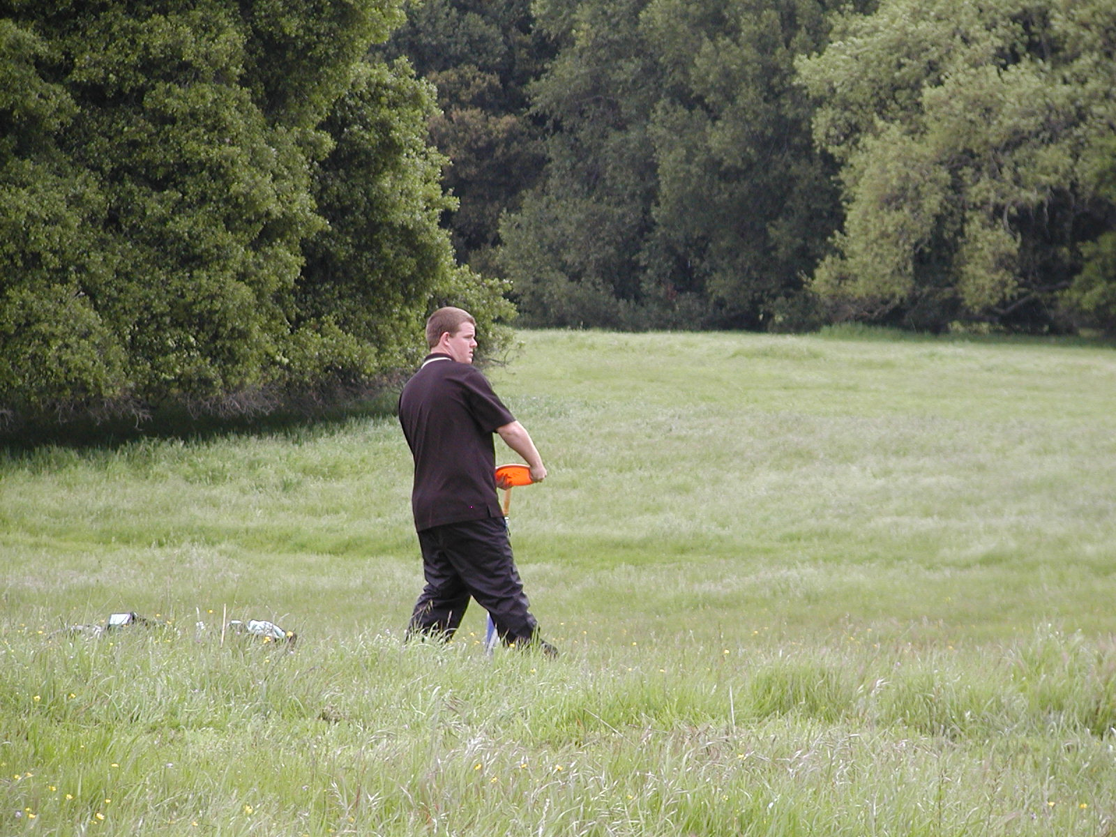 Nate doss